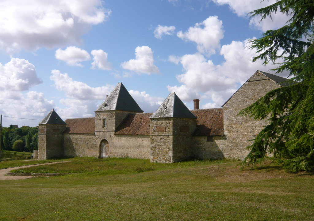 Manoir de La Taille, château de Bondaroy, Loiret, Centre, France